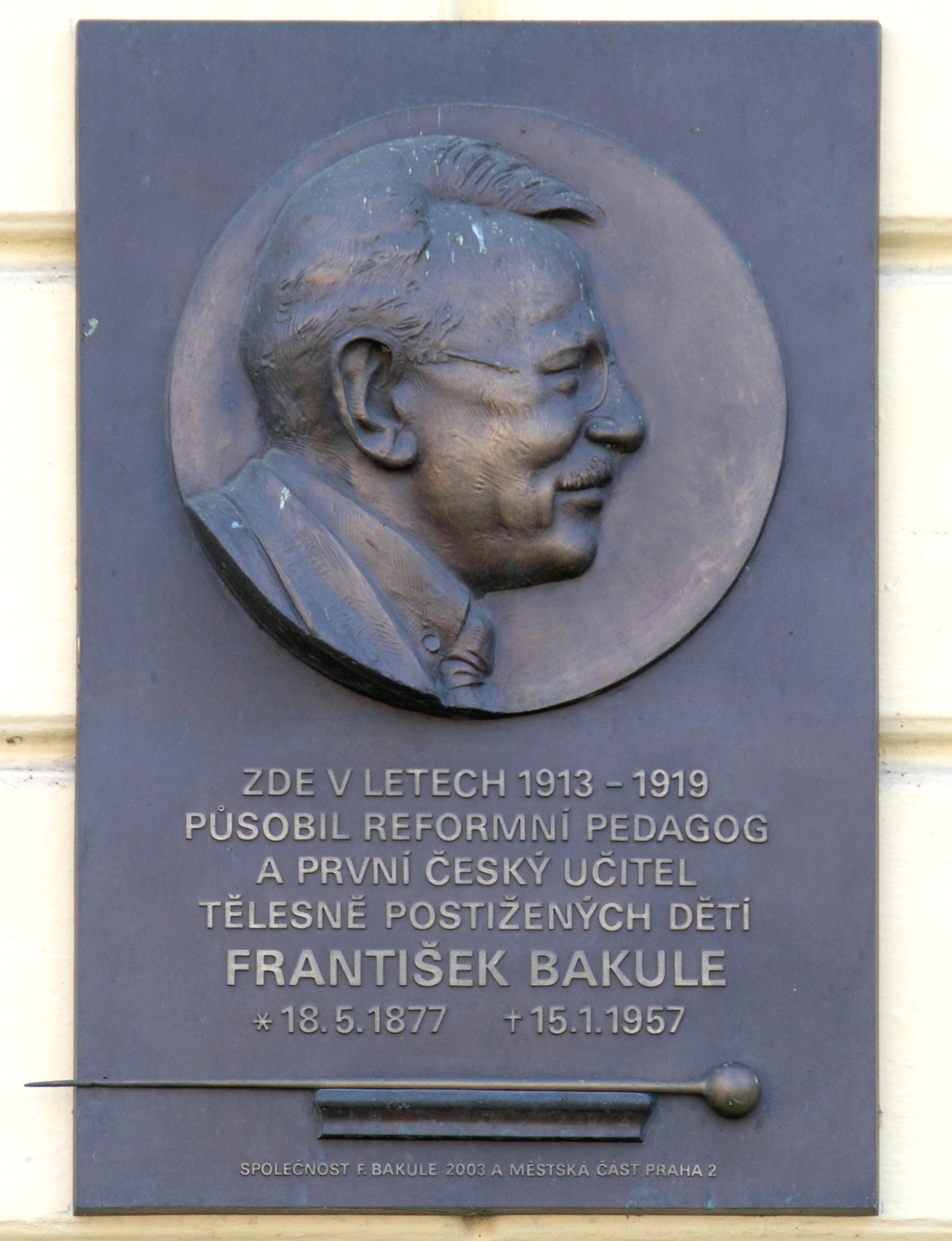 Praha, Vyšehrad